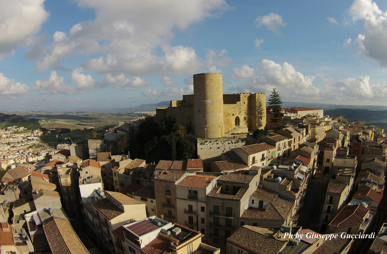 Castello normanno, Salemi. Veduta da drone